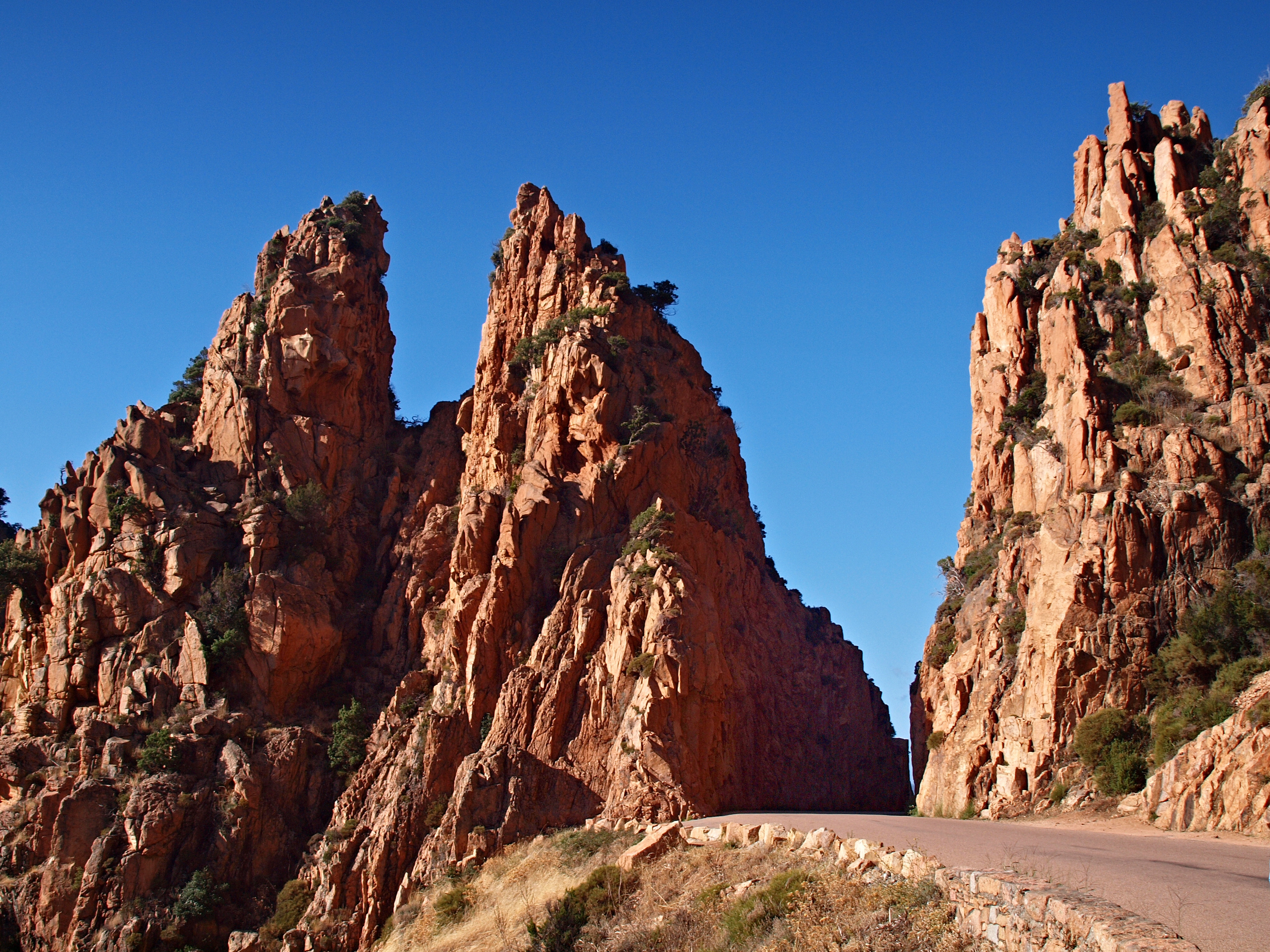 Piana, Ouest Corse (Corse) - La RD81 dans la traversée des Calanche de Piana